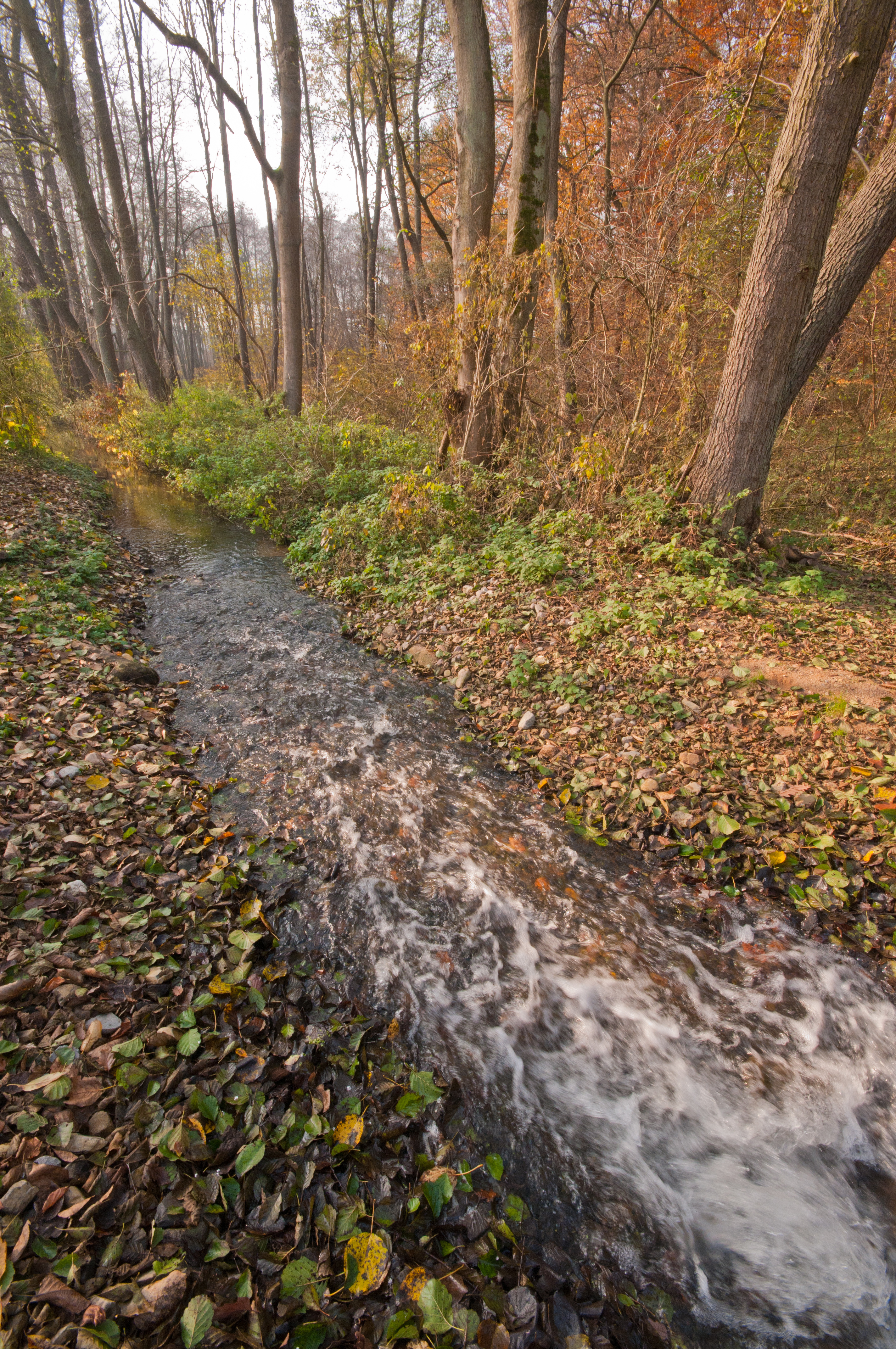 Ragöse in Höhe Sandkrug Ragöse an der Stelle, wo wahrscheinlich früher die gleichnamige Mühle gestanden hat